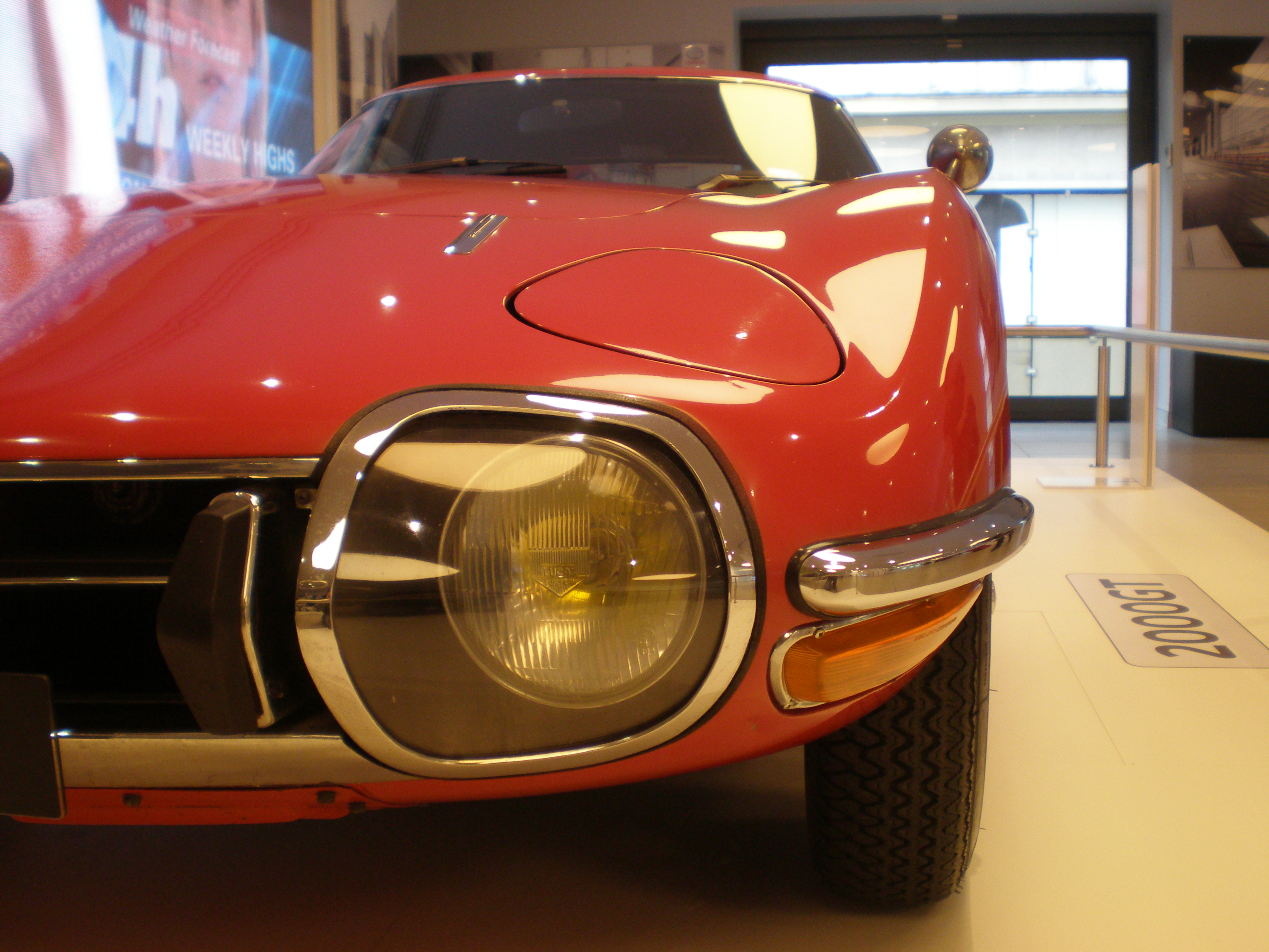 Un des optiques de la Toyota 2000GT. Exposée dans un point de vente Toyota aux Champs Elysées.